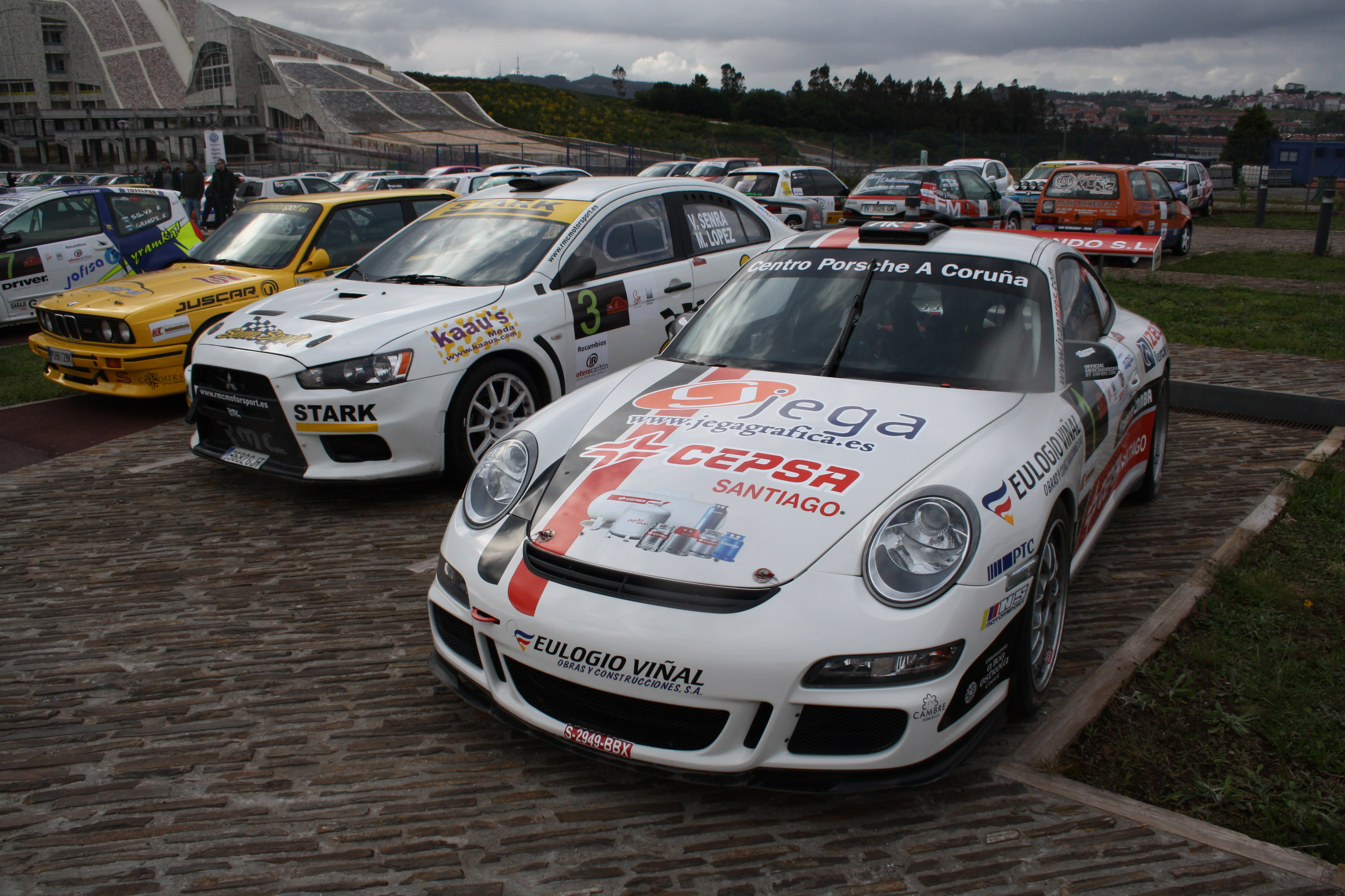 Rally Botafumeiro 2014. Parque cerrado ubicado en la Ciudad de la Cultura (GAIAS). Santiago de Compostela.